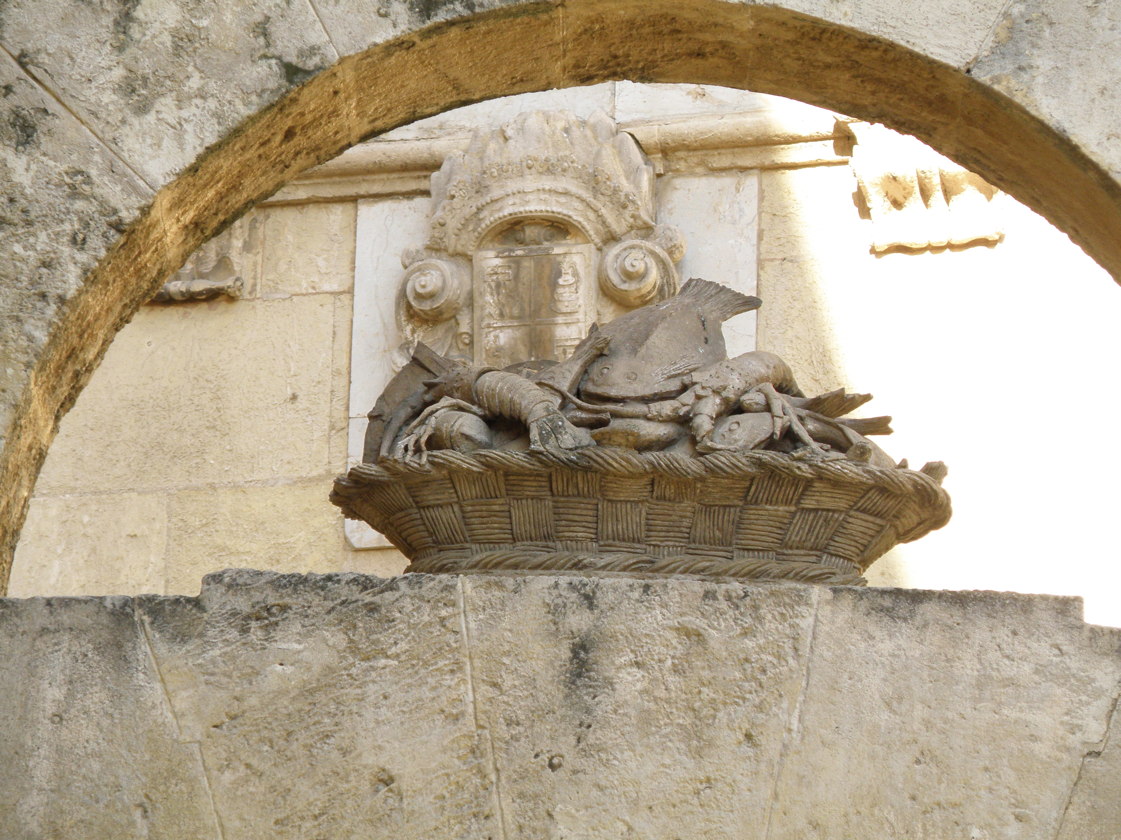 Antiga plaça del mercat de Reus, Baix Camp. Detall sobre les arcades de l'entrada propera a l'església.